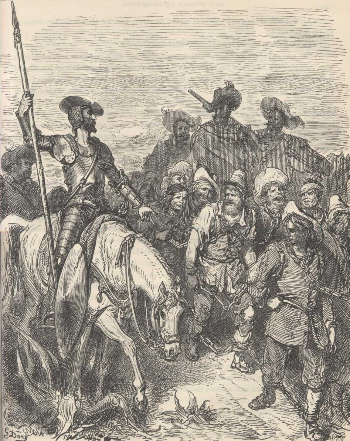 Dom Quixote encontra o grupo de condenados